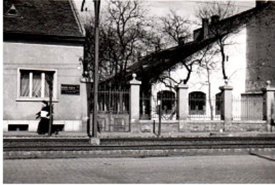 Fehér Ferenc Elektromos Finommechanikai Készülékek Gyára